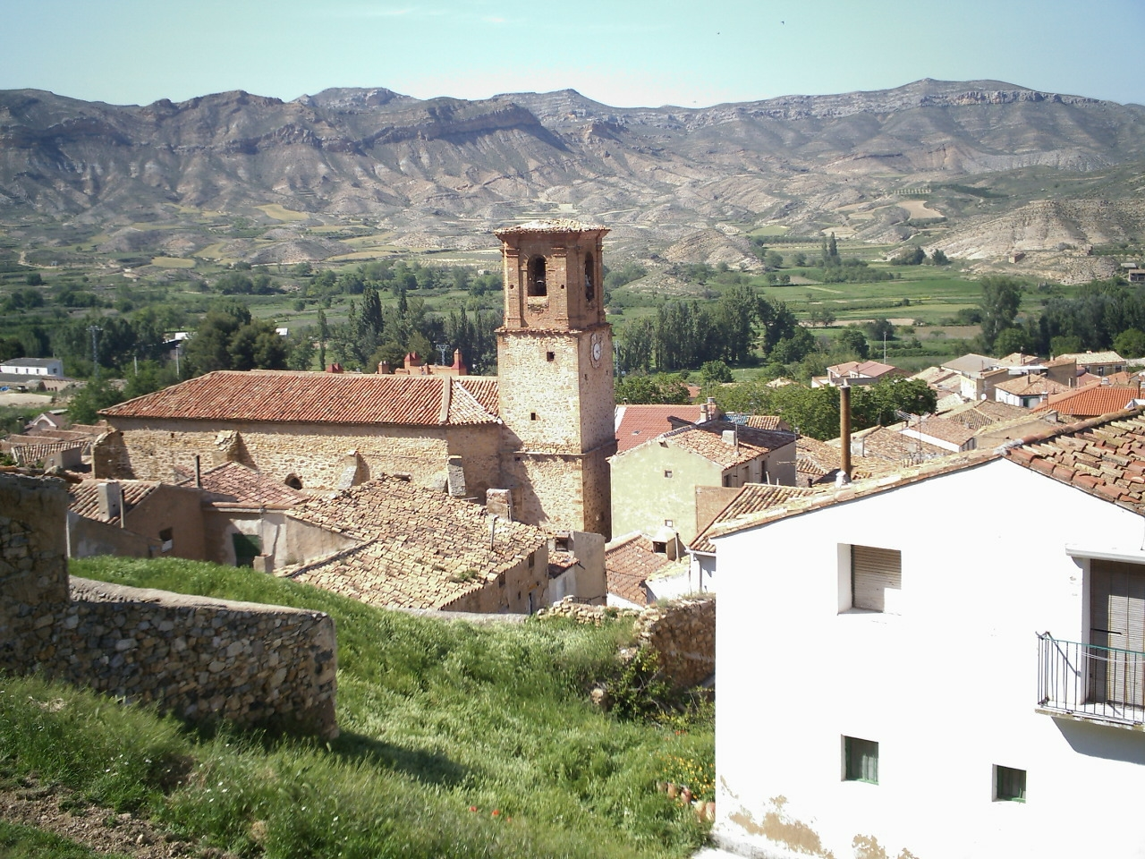 Aguilar del Río Alhama - La Rioja (Spain)